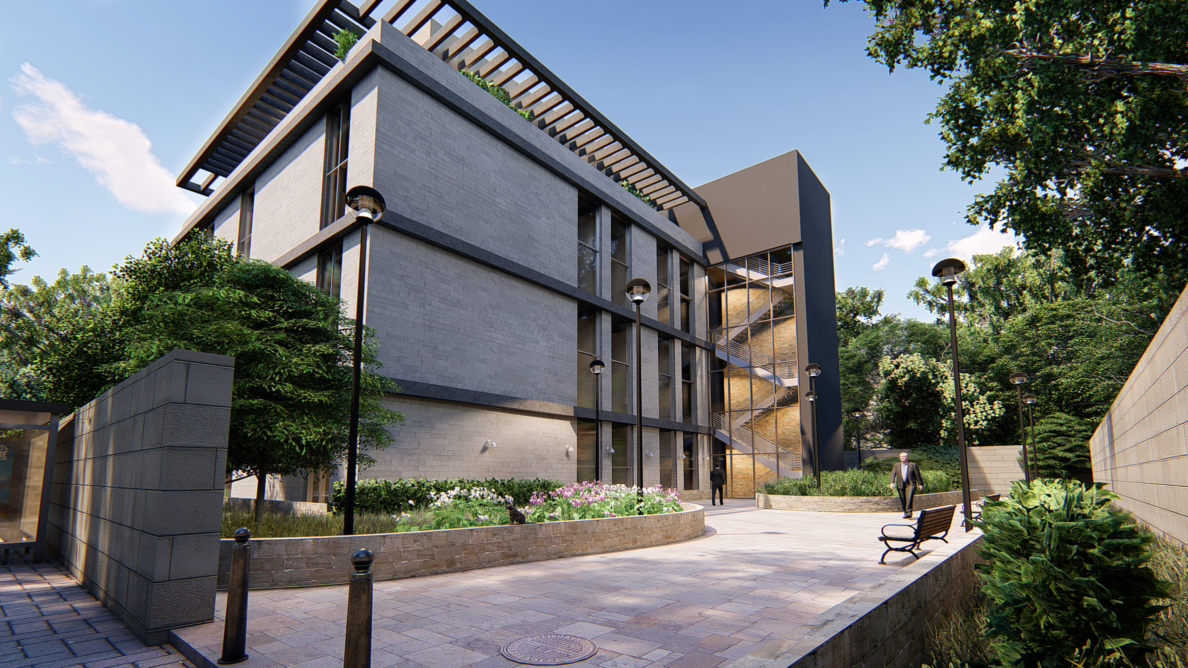 הדמיה אדריכלית של קמפוס סטונדטים